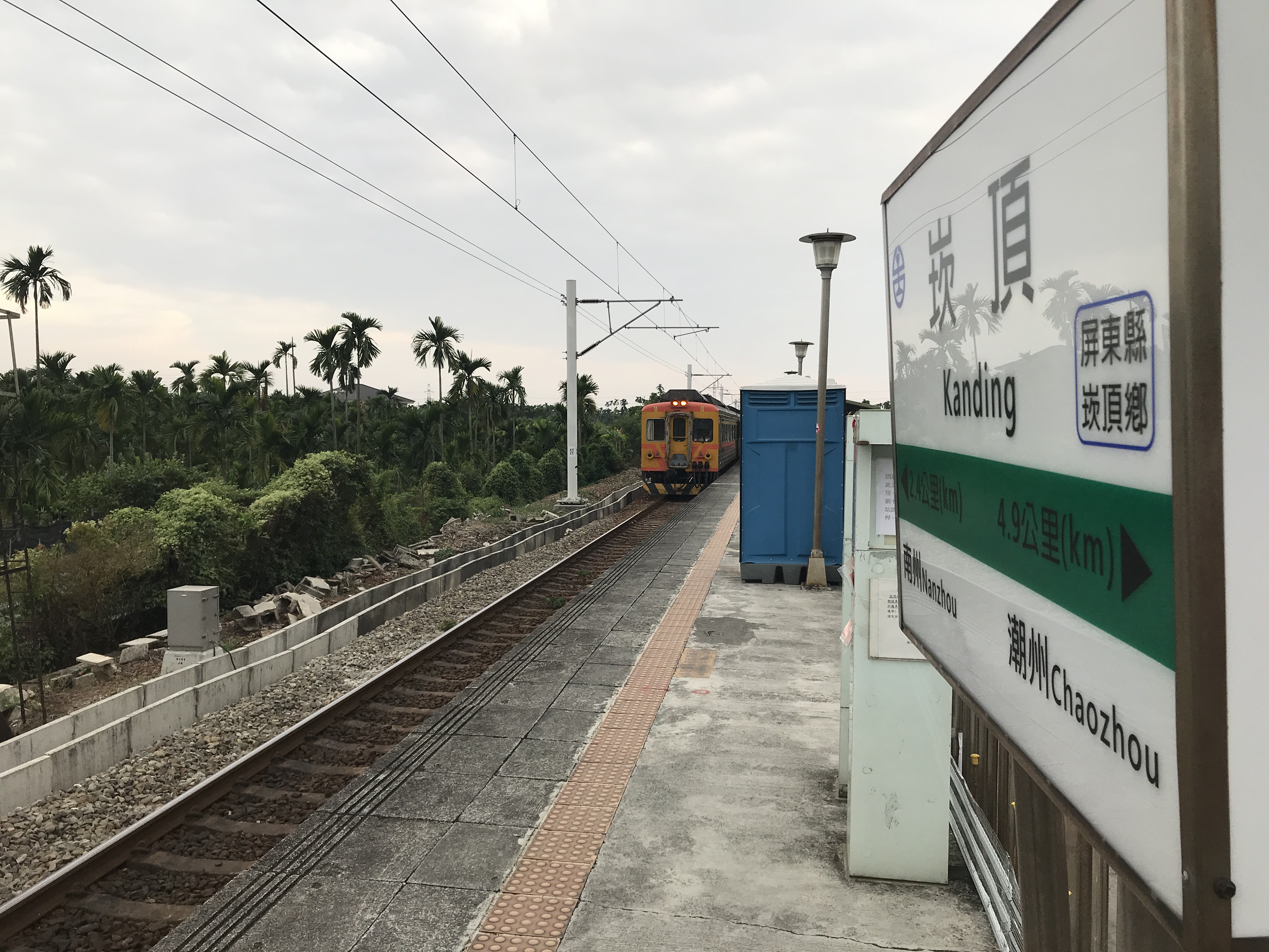 臺灣鐵路管理局DR3000型柴聯車即將停靠崁頂車站。此為第3532車次區間車。